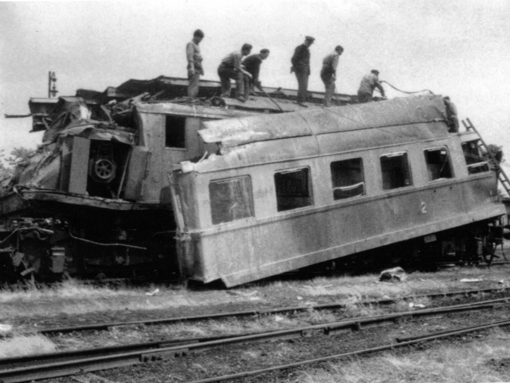 Incidente ferroviario di Voghera 1962